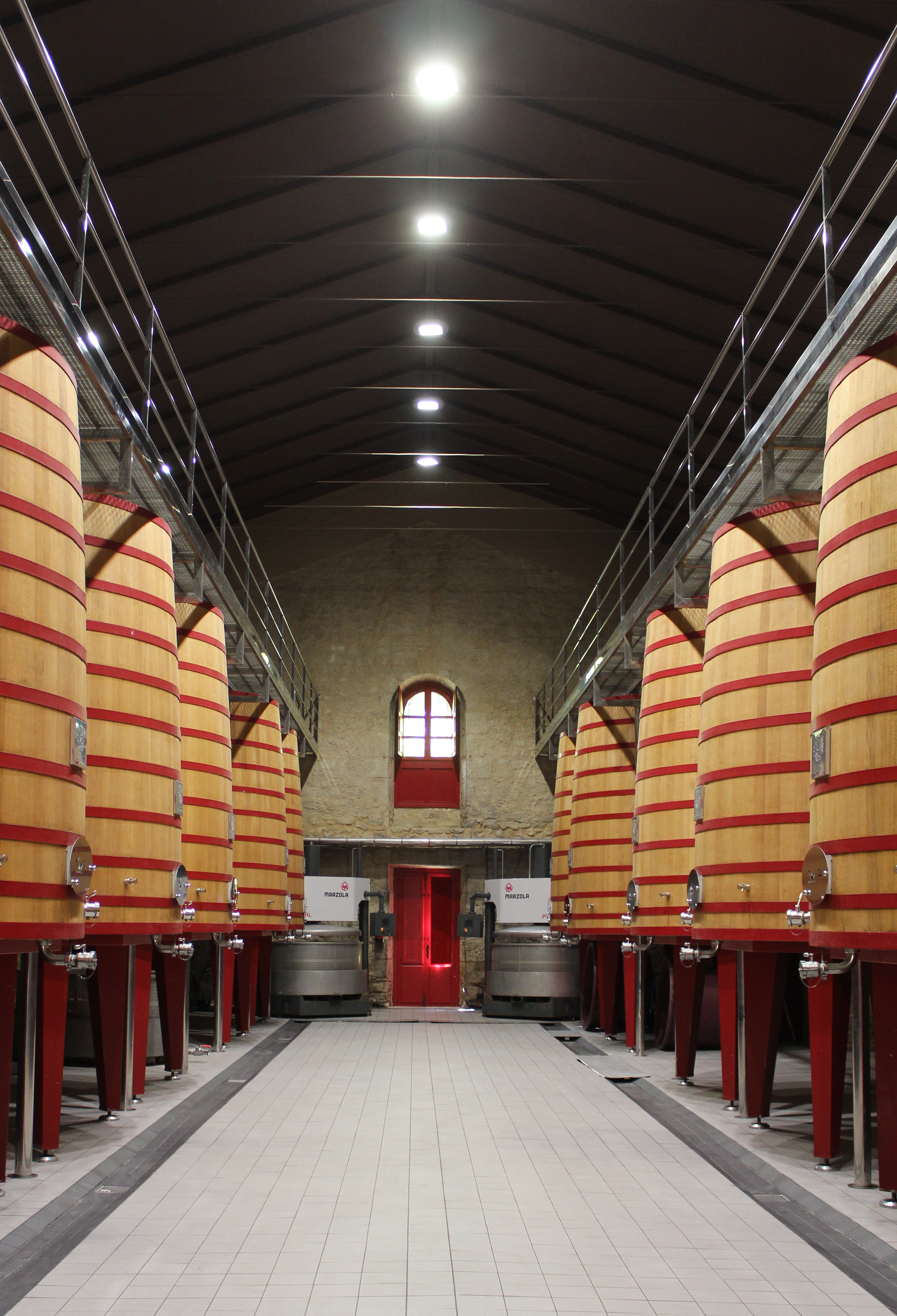 Elciego, Bodegas Marqués de Riscal: Holzbottiche aus Eiche sind traditionelle Gärbehälter der Rotweinherstellung